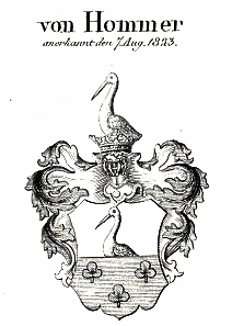 Wappen derer von Hommer (Reichsadel 1789; in Preußen anerkannt 1823)